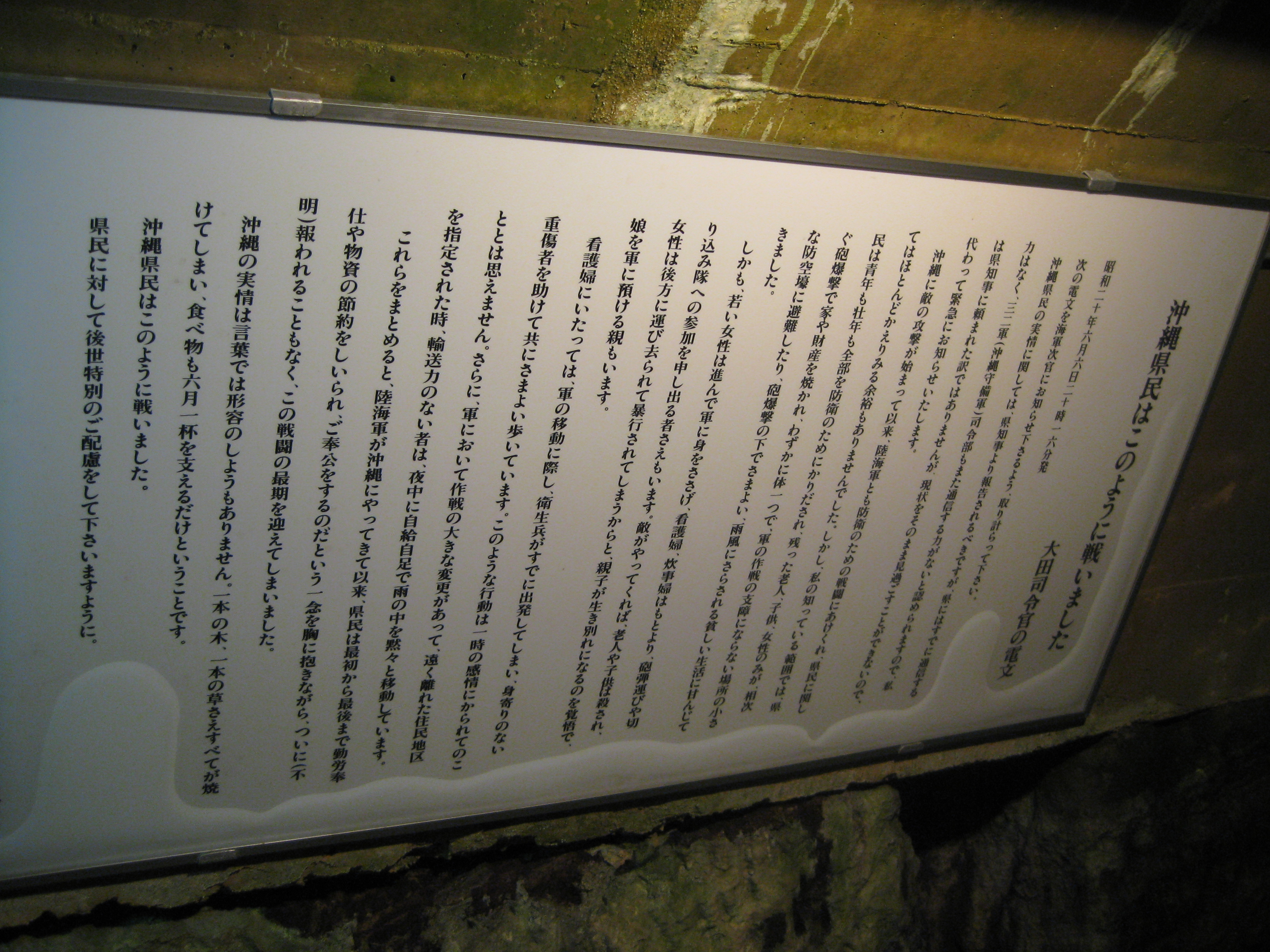 大田実陸軍中将の電文